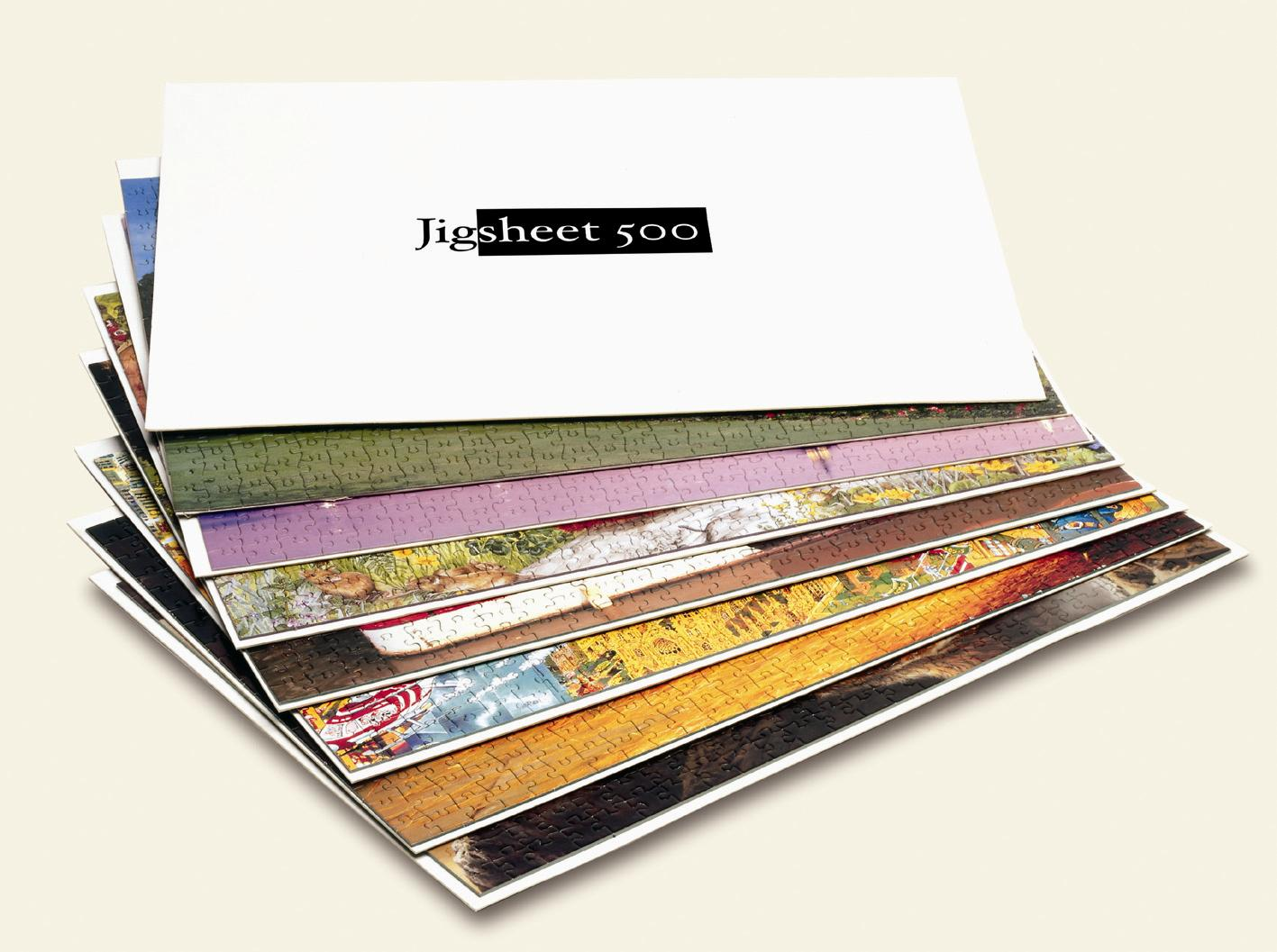 Jigstore